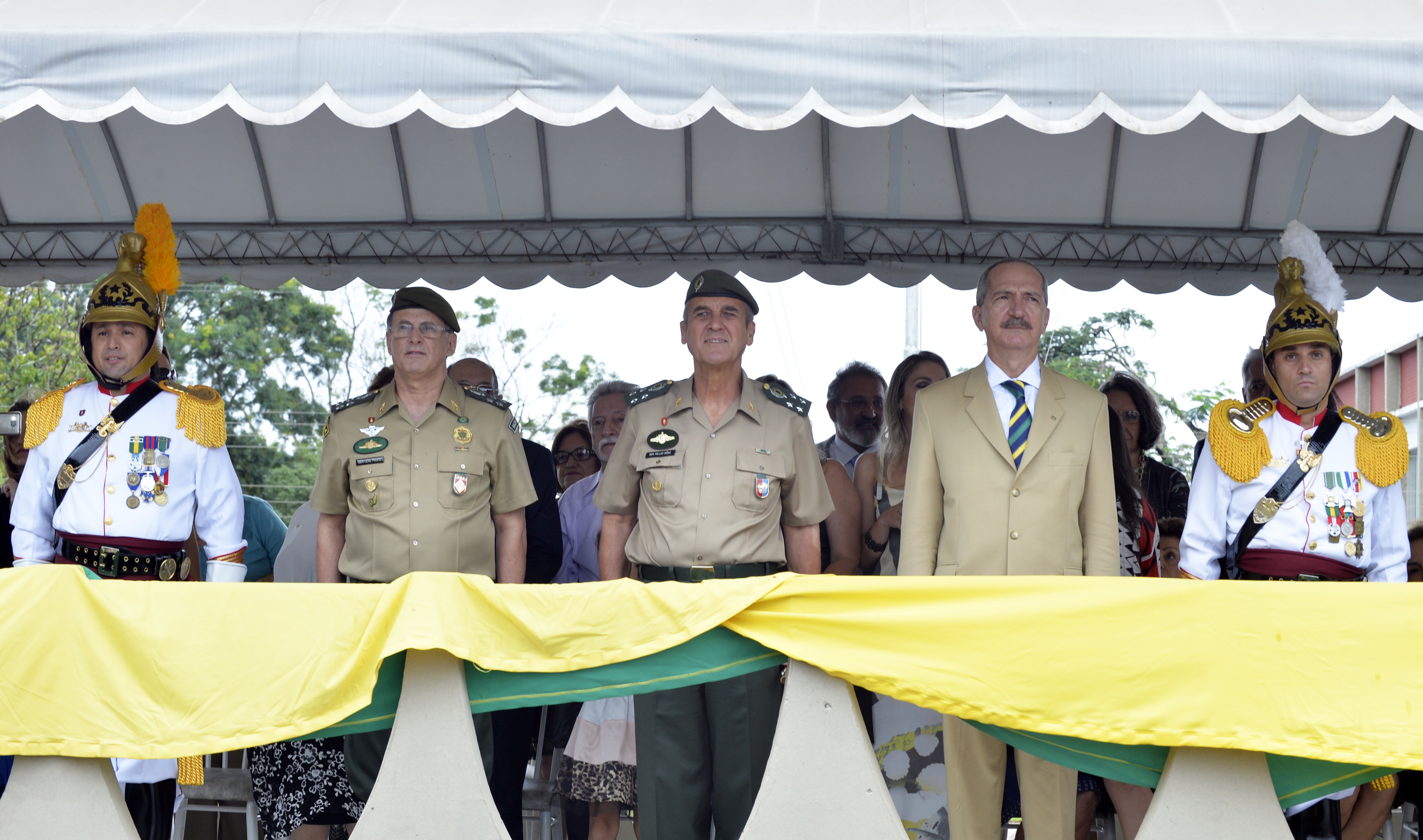 15/01/2016, Brasília - DF Fotos: Gilberto Alves